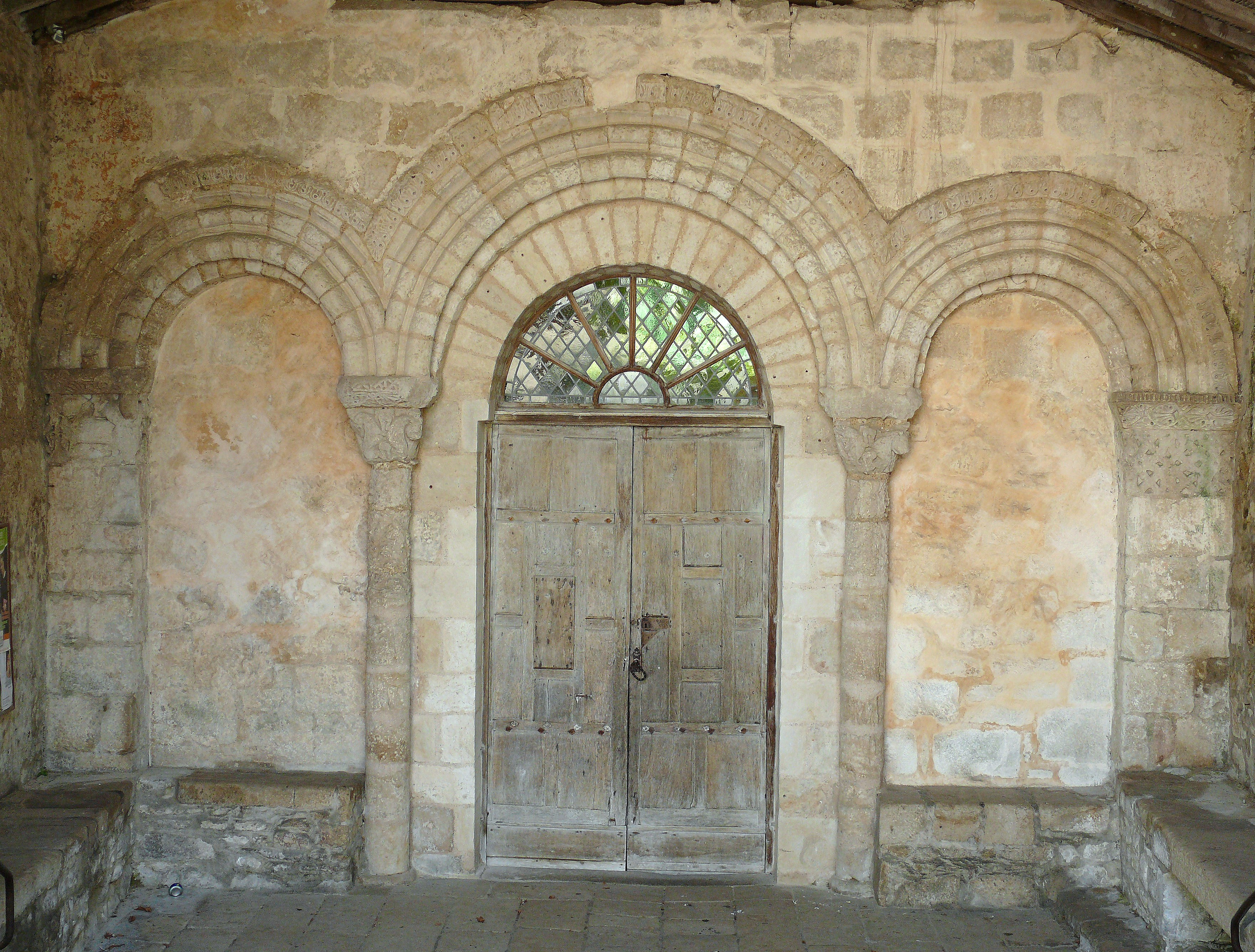 Champdeniers-Saint-Denis - Eglise Notre-Dame - Portail